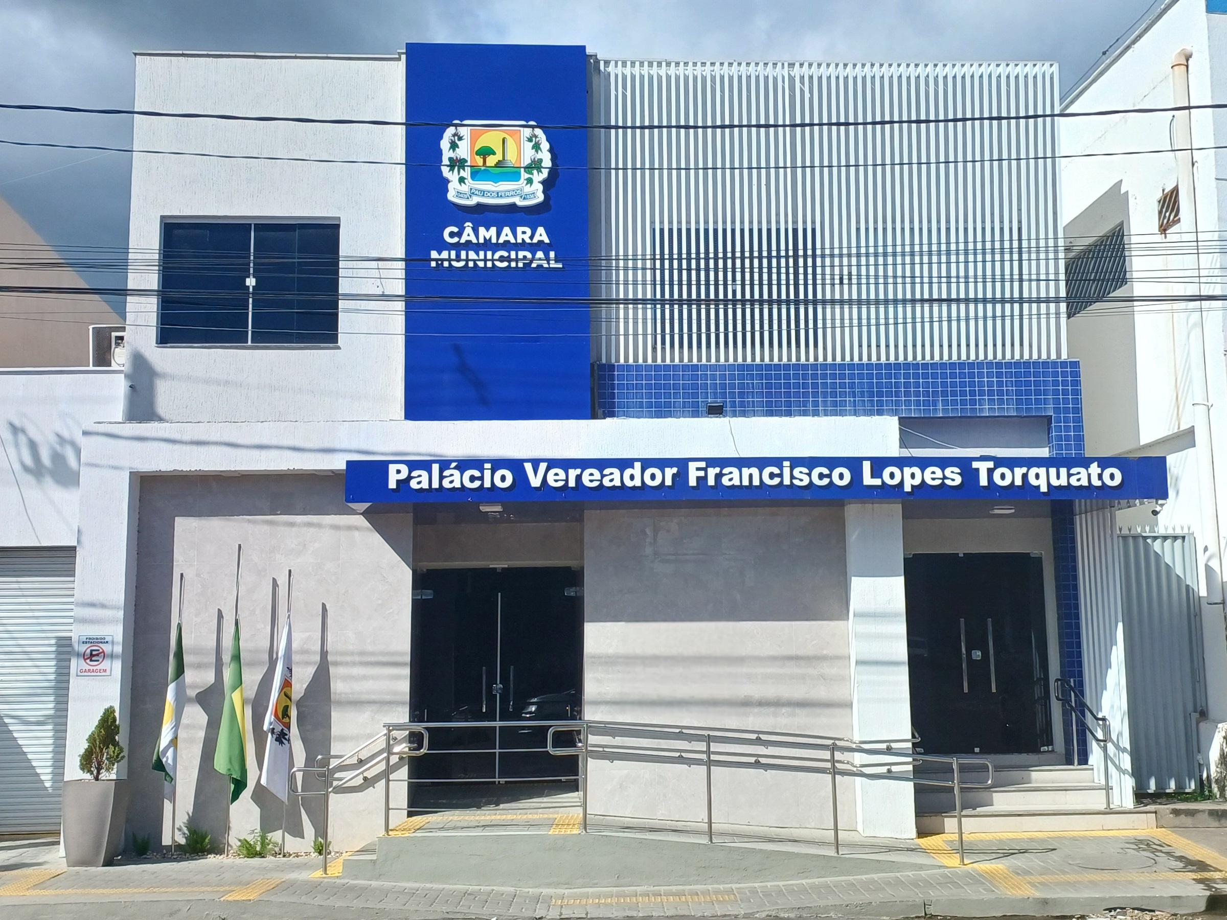 Palácio Vereador Francisco Lopes Torquato, onde funciona a Câmara Municipal de Vereadores de Pau dos Ferros, Rio Grande do Norte, Brasil.